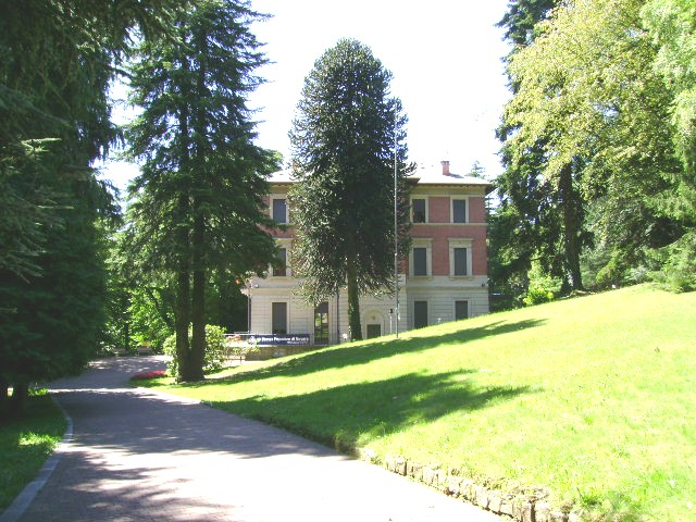 "Villa Bernocchi" in Premeno (Province of Verbano-Cusio-Ossola, Italy)